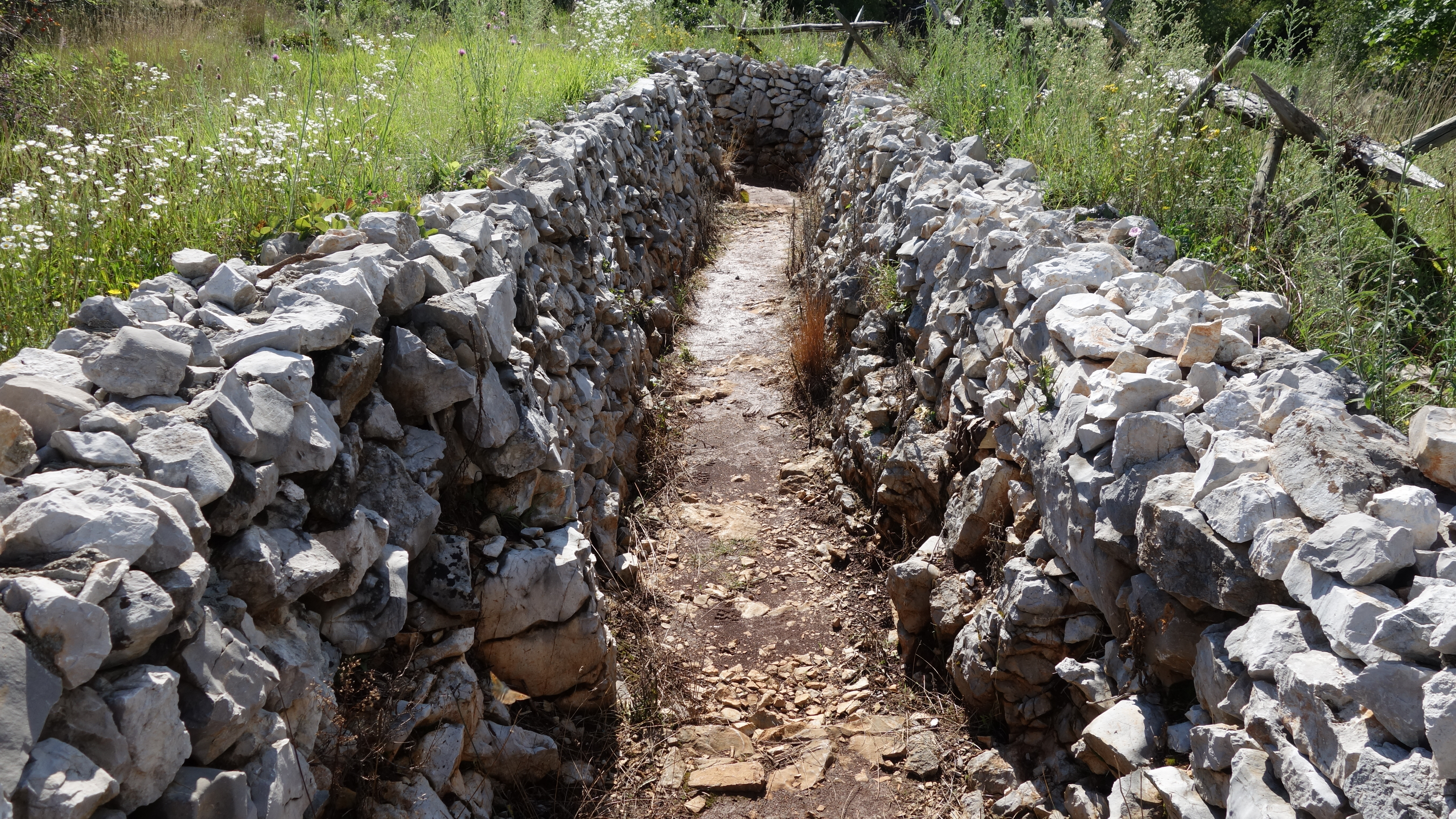 Monte Sei Busi (Gorizia) - Trincea italiana della Grande Guerra